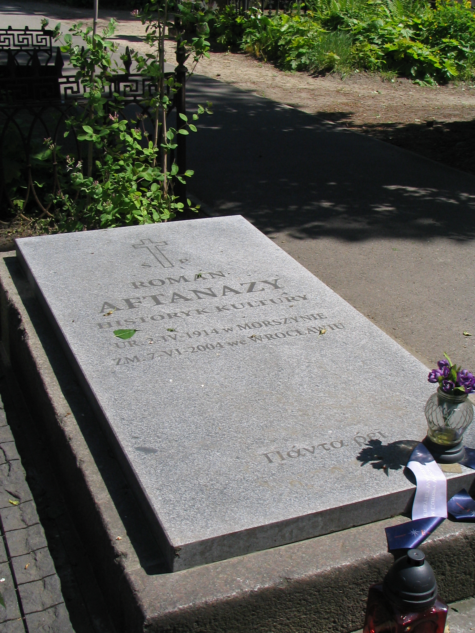 Nagrobek Romana Aftanazego na Cmentarzu Powązkowskim, Warszawa, 14 maja 2008. Roman Aftanazy.